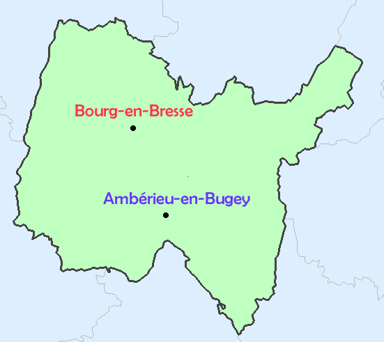 Carte de localisation d'Ambérieu-en-Bugey